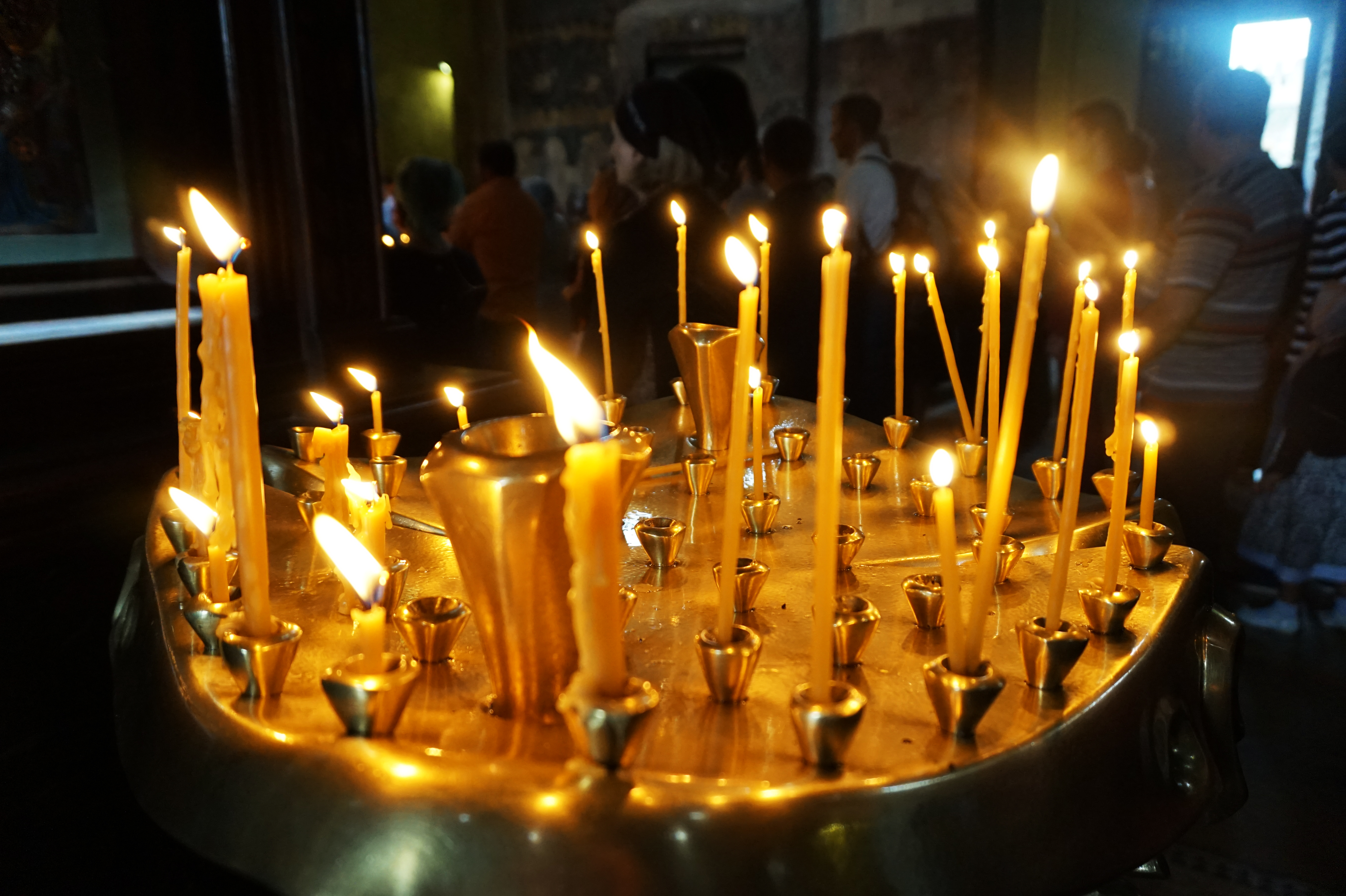 生命之柱教堂烛台。